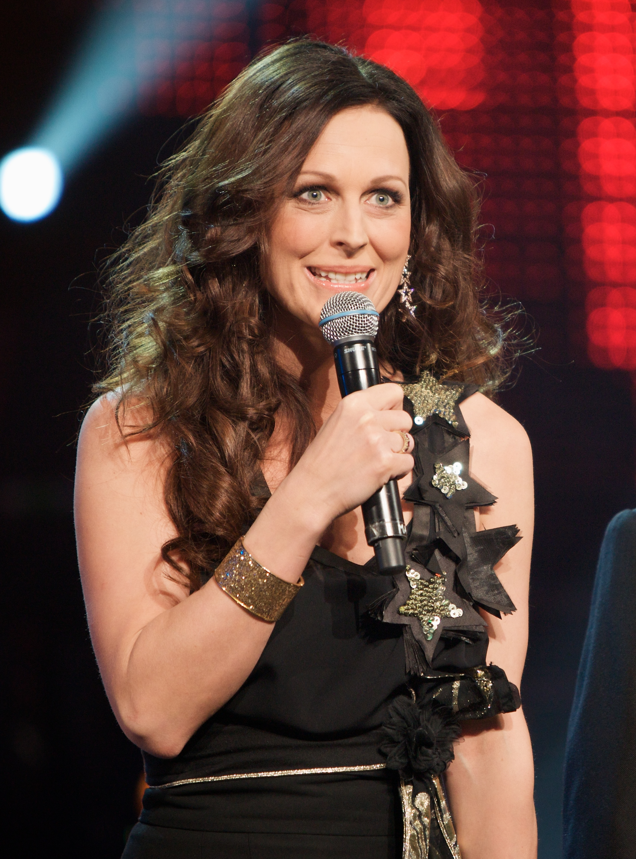 Marte Stokstad og Per Sundnes under MGP 2010 i Skien.